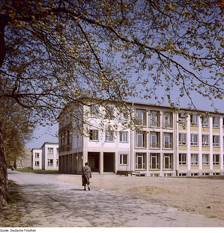 Original image description from the Deutsche Fotothek Dresden. Schule